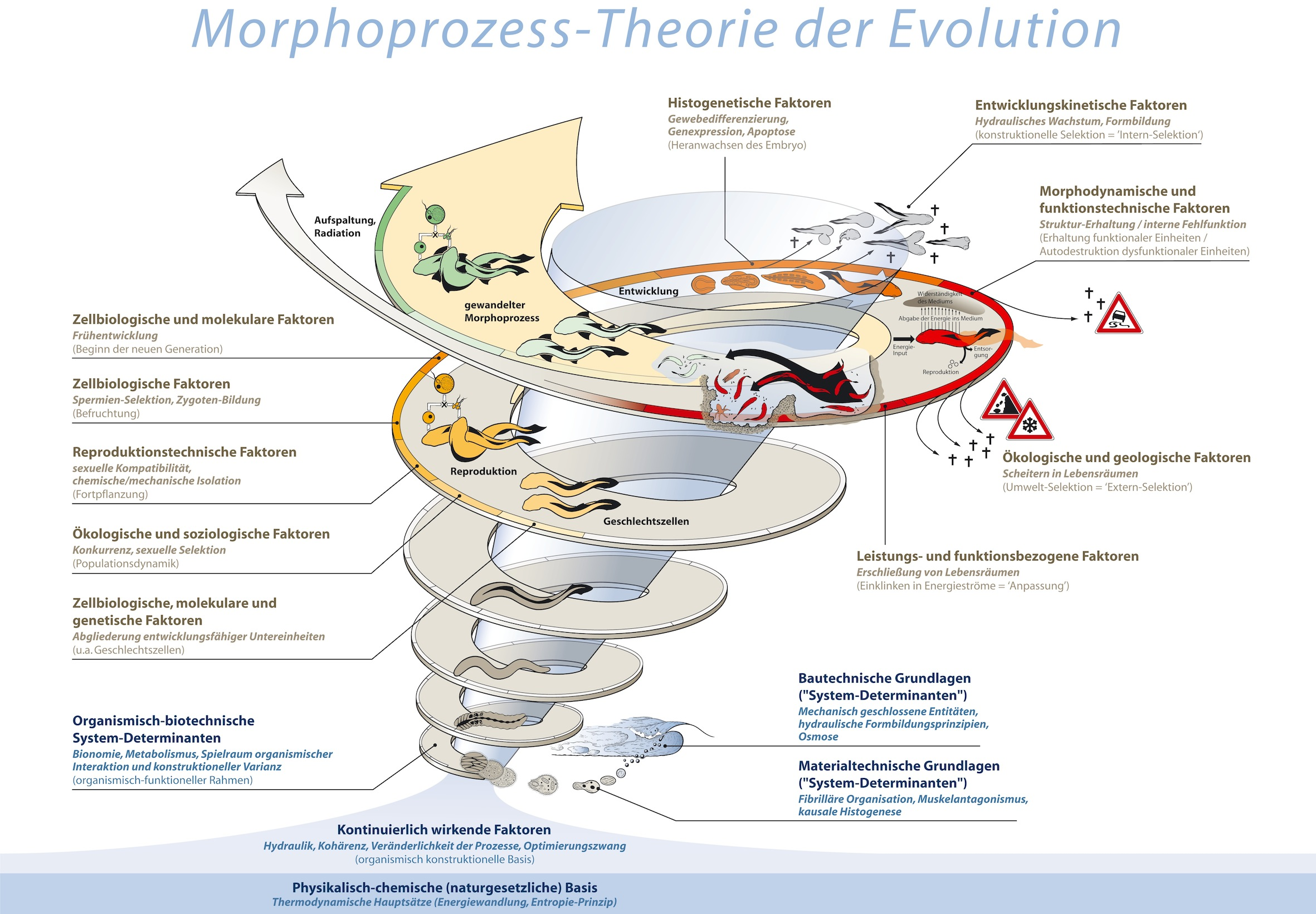 Morphoprozess-Theorie der Evolution: Evolution ist nicht Ursache, sondern Ergebnis der kontinuierlichen organismischen Wandlung. Dieser Prozess läuft unter bestimmten Rahmenbedingungen ab, die durch die Naturgesetze und durch die spezifisch organismischen Baumaterialien und Bauweisen vorgegeben sind. Angetrieben wird der Wandlungsprozess durch den kontinuierlichen Energiewandel welchen die Organismen bei all ihren Aktivitäten betreiben. Hierzu zählen insbesondere die Individualentwicklung und die Reproduktion mit der generationenübergreifenden Weitergabe entwicklungsfähiger Geschlechtszellen. Auf diesen Vorgang wirken vielfältige Faktoren ein, welche den konkreten Ablauf und damit das Ergebnis beeinflussen. Kurz gesagt ist der organismische Wandel ein Prozess, der von den naturgesetzlichen Rahmenbedingungen ermöglicht, von Evolutionsmechanismen angetrieben und von Evolutionsfaktoren beeinflusst wird. Namensnennung: Manfred Grasshoff, Michael Gudo, Tareq Syed